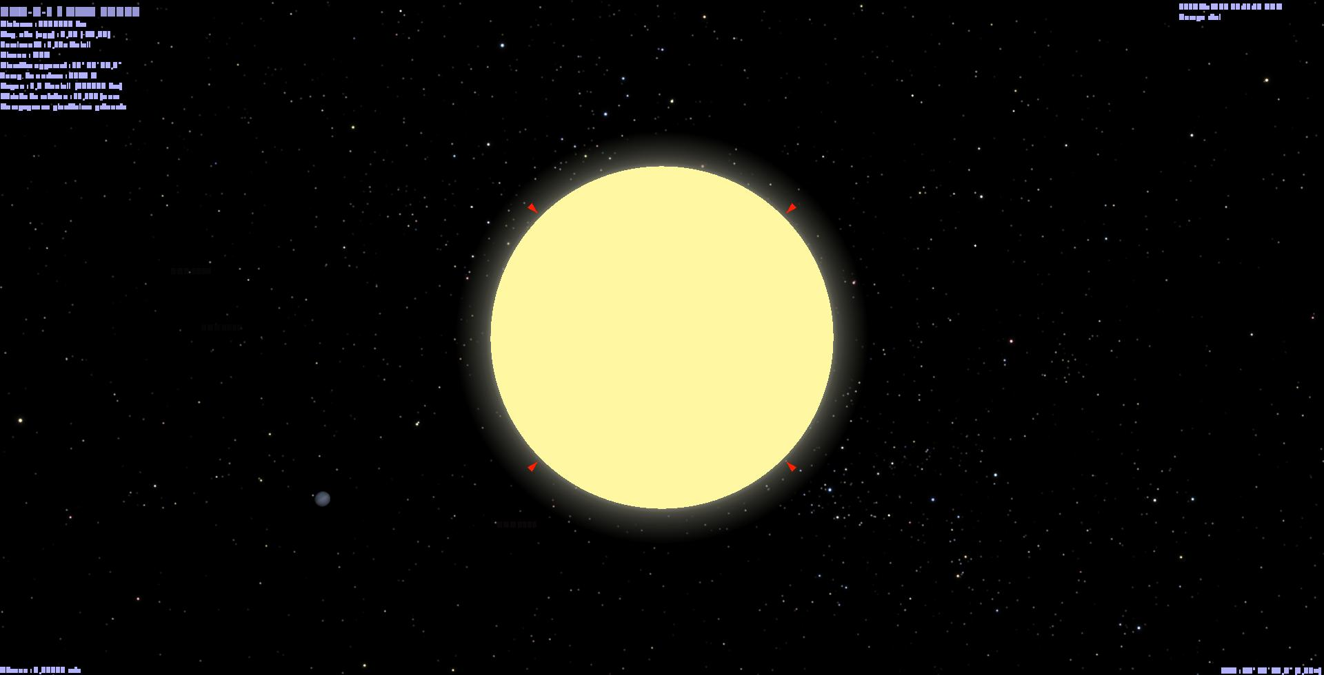 Voici la taille de HAT-P-1b (en bas de l'étoile a gauche) comparer a son étoile.